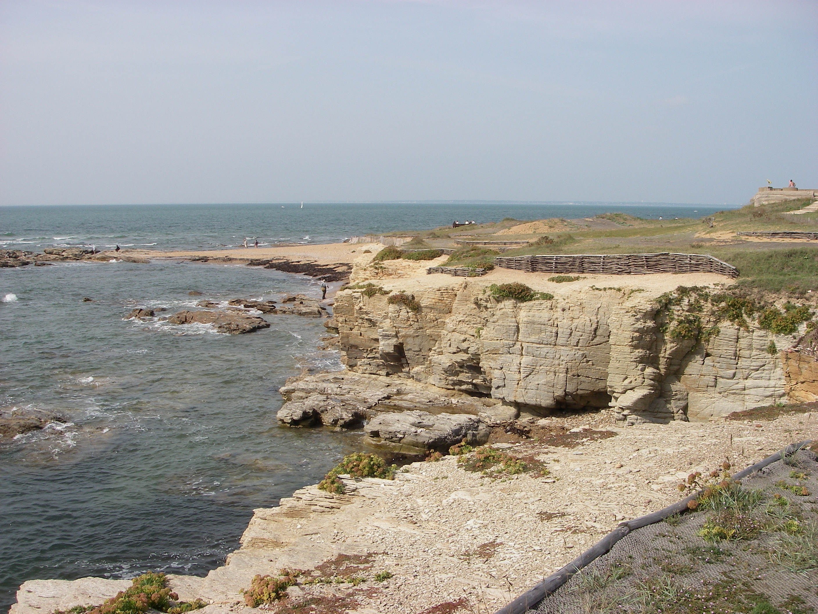 Paysage de la pointe Saint Gildas en Loire Atlantique, photo personnelle, Septembre 2006